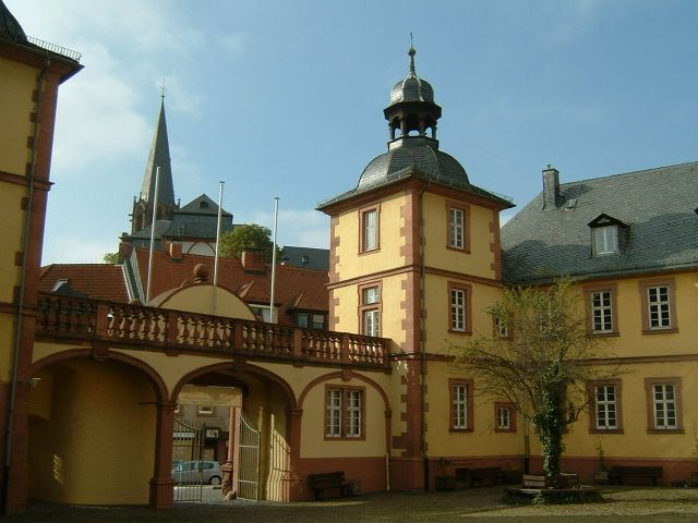 Schönborner Hof in Aschaffenburg, ein barockes Gebäude des 17. Jahrhunderts